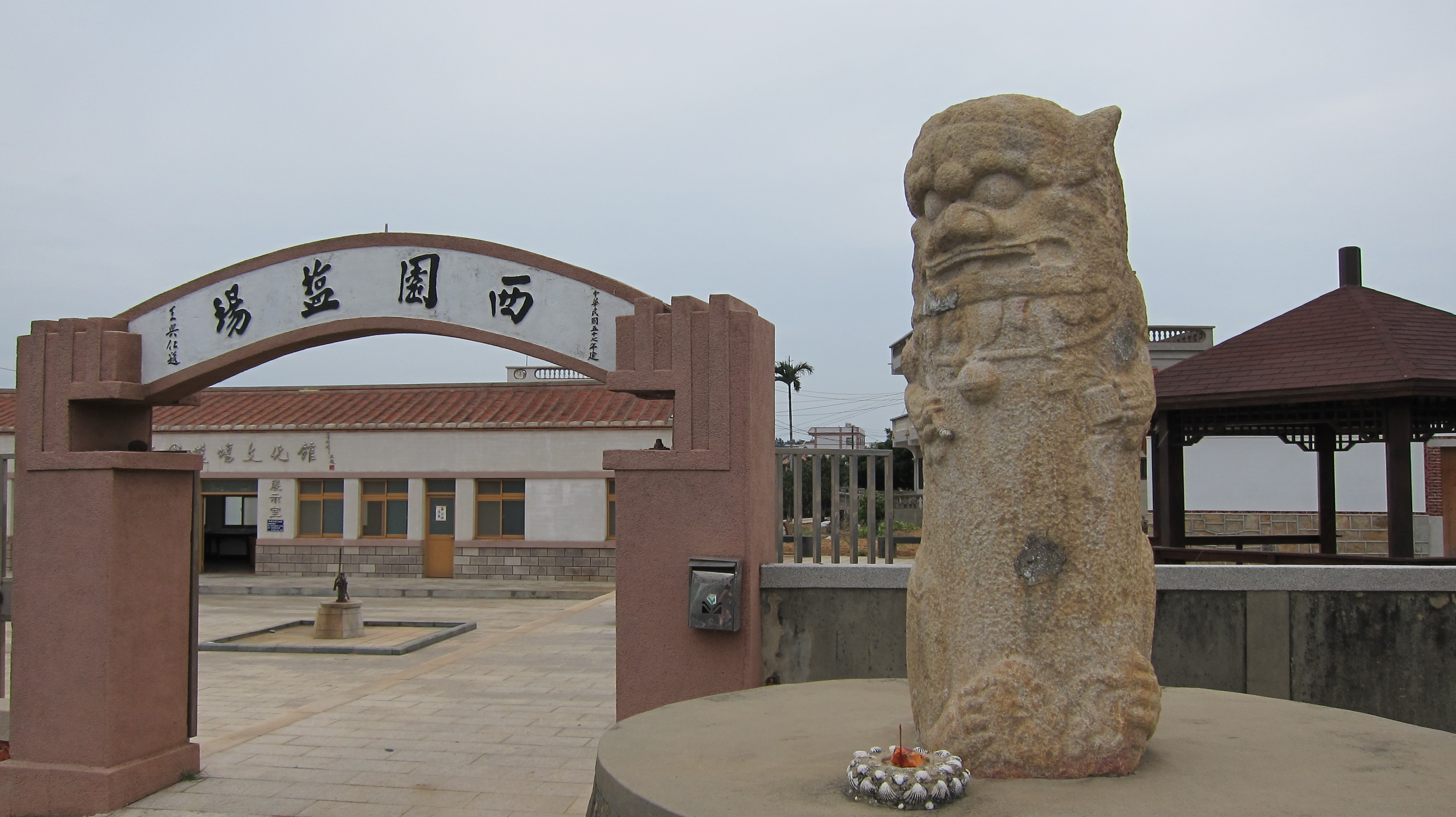 西園鹽場入口與風獅爺